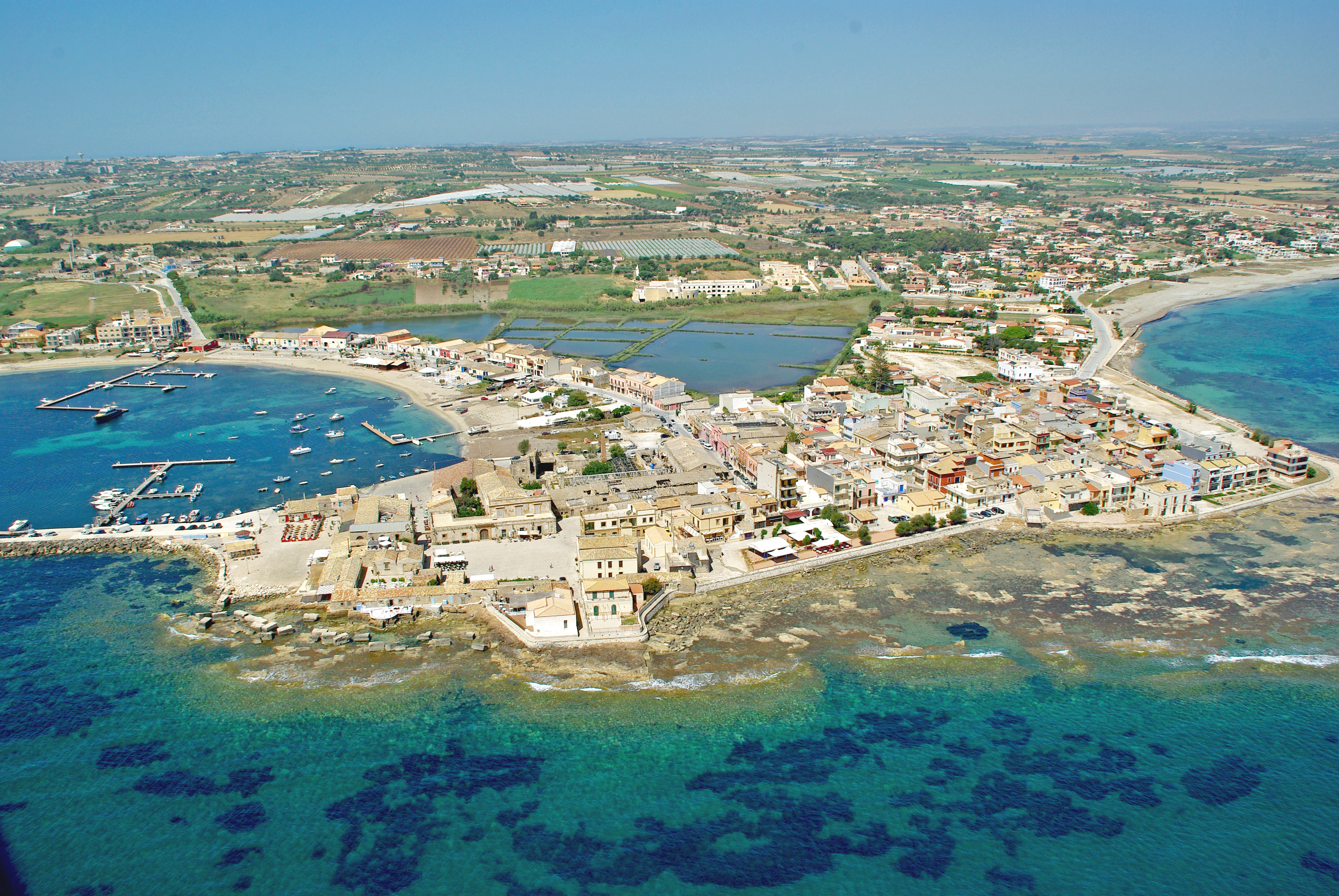 Marzamemi